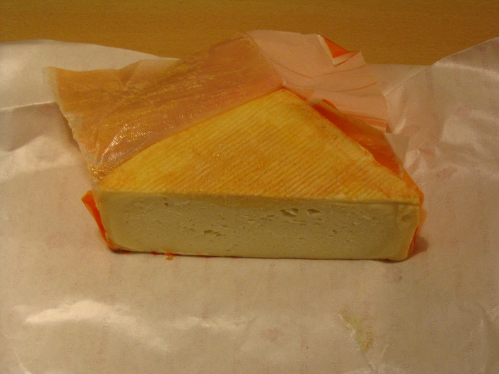 Image:maroilles.jpg Origine : Photo prise par Antoinel.